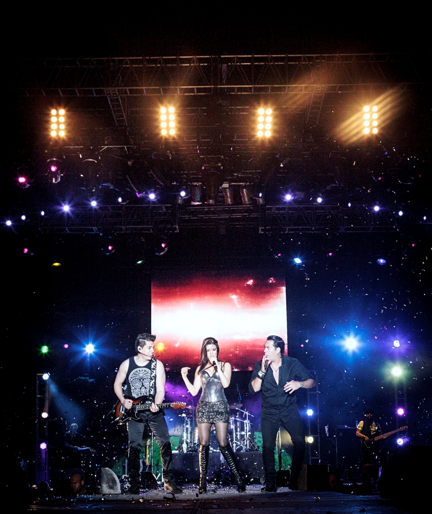 Banda Matute en concierto.